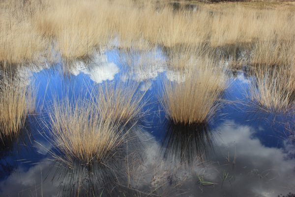 Himmel und Ääd - als Rheinländer gesagt - trifft dieses in einem Bild zu. Der Himmel und die Erde. so gesehen im Heseper Moor.